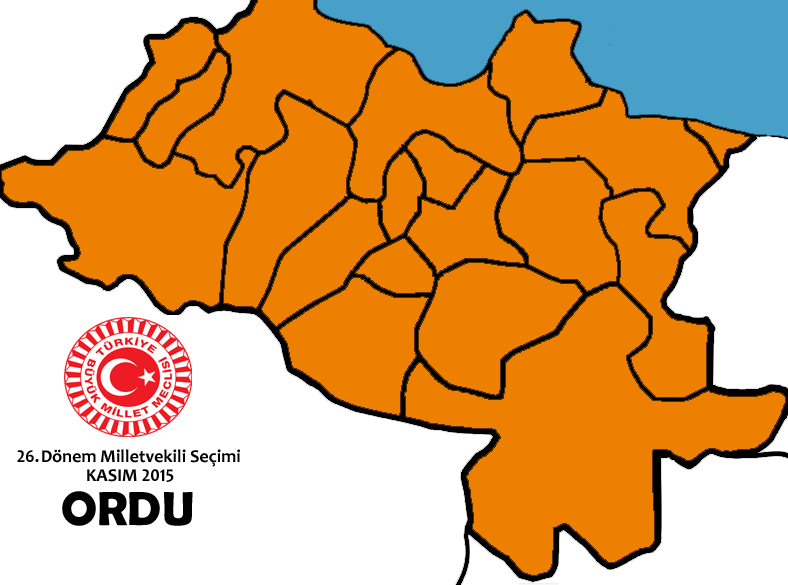 Kasım 2015 Seçimleri